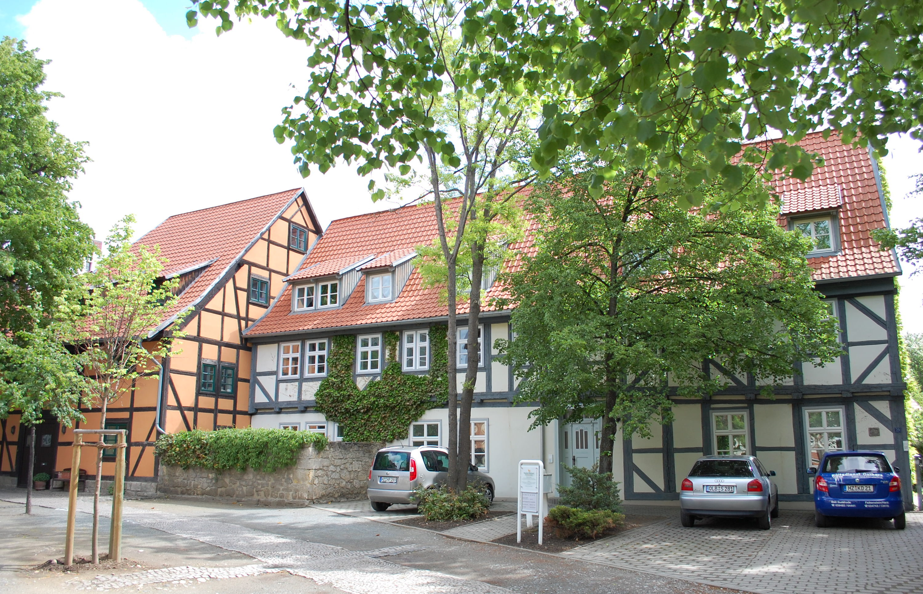 Haus Adelheidstraße 23 in Quedlinburg